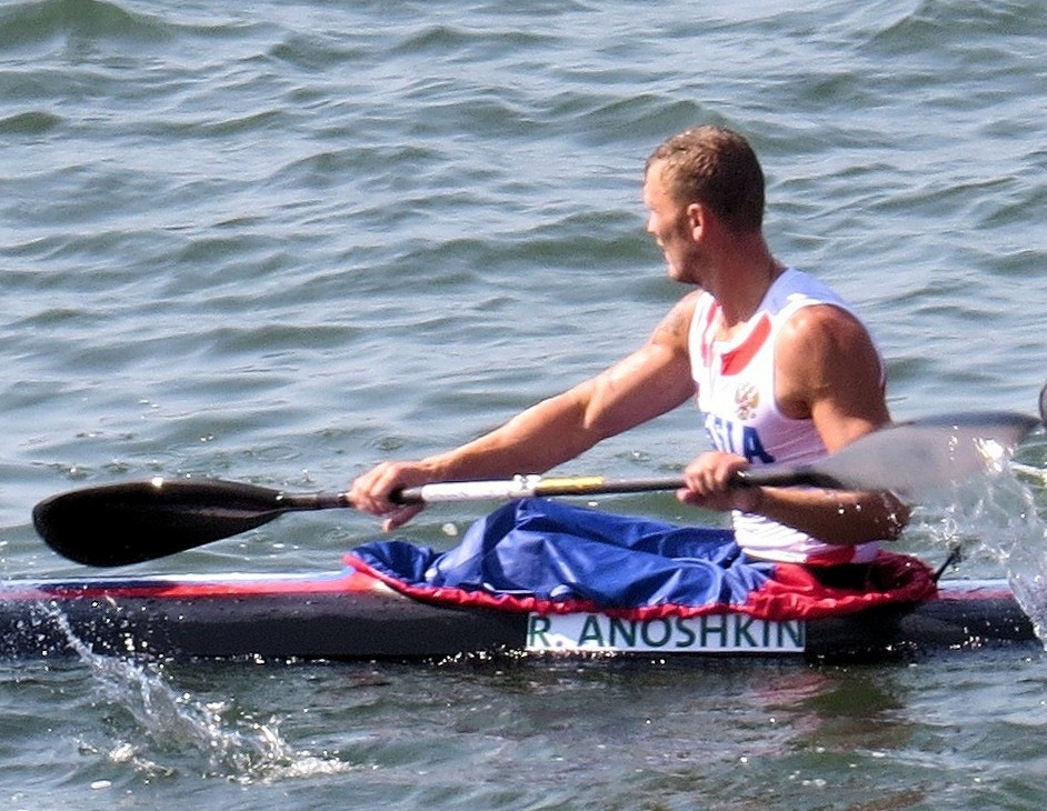 Байдарка четвёрка на летней Олимпиаде 2016 в Рио.